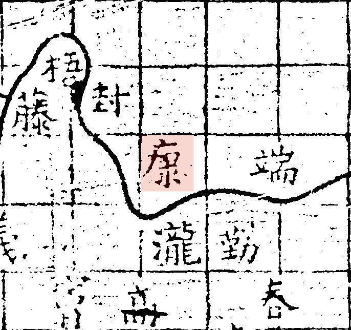 粵語: 禹跡圖中嘅康州